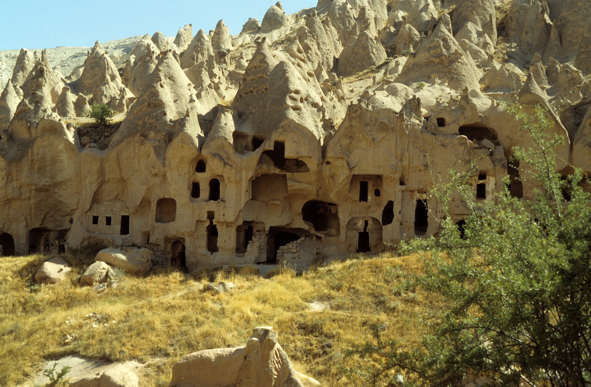 Höhlenwohnungen in Zelve, Kappadokien, Zentraltürkei